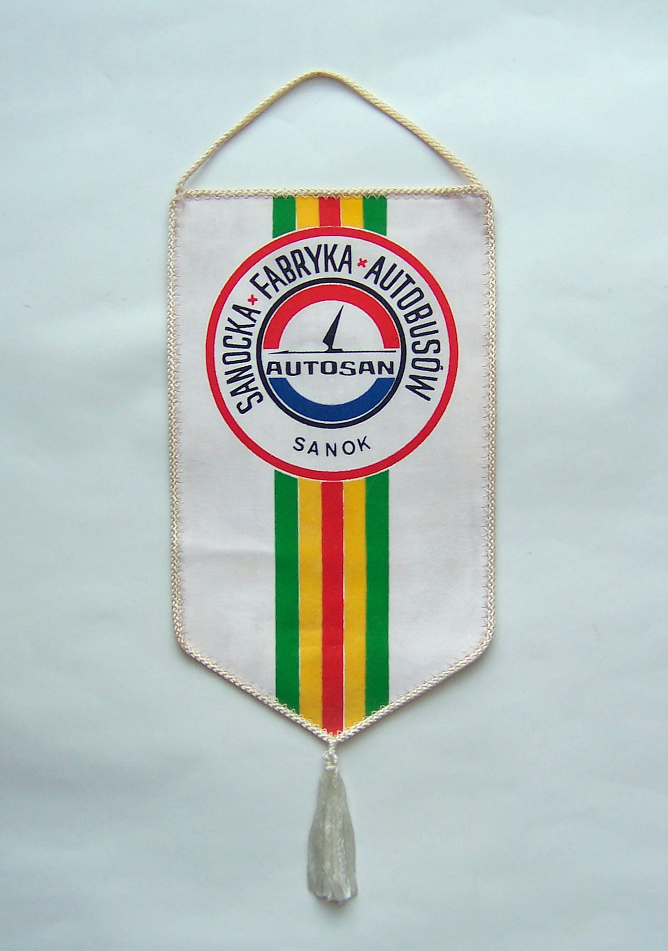 Proporczyk Sanockiej Fabryki Autobusów w Sanoku sprzed 1989 roku.